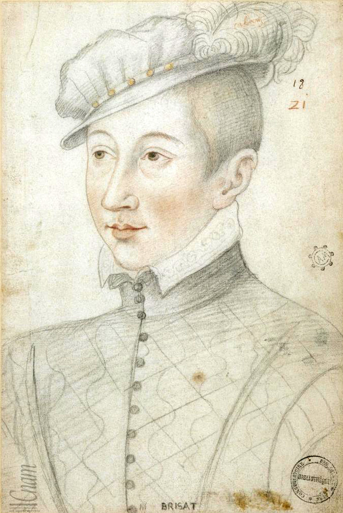 Portrait au crayon de Timoléon de Cossé, comte de Brissac, dans le "recueil des Arts et Métiers" (dessins français de la Renaissance dans le style des Clouet). Bibliothèque du Conservatoire national des Arts & Métiers (CNAM).